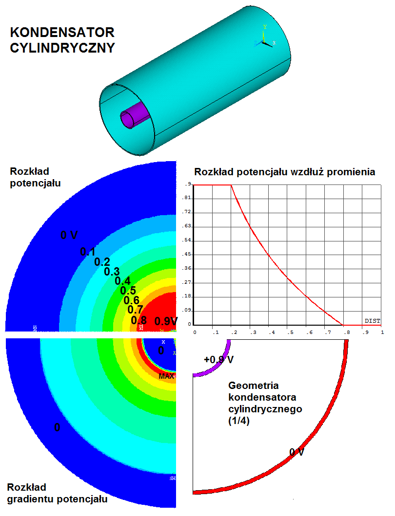 Rozkład potencjałów w kondensatorze cylindrycznym